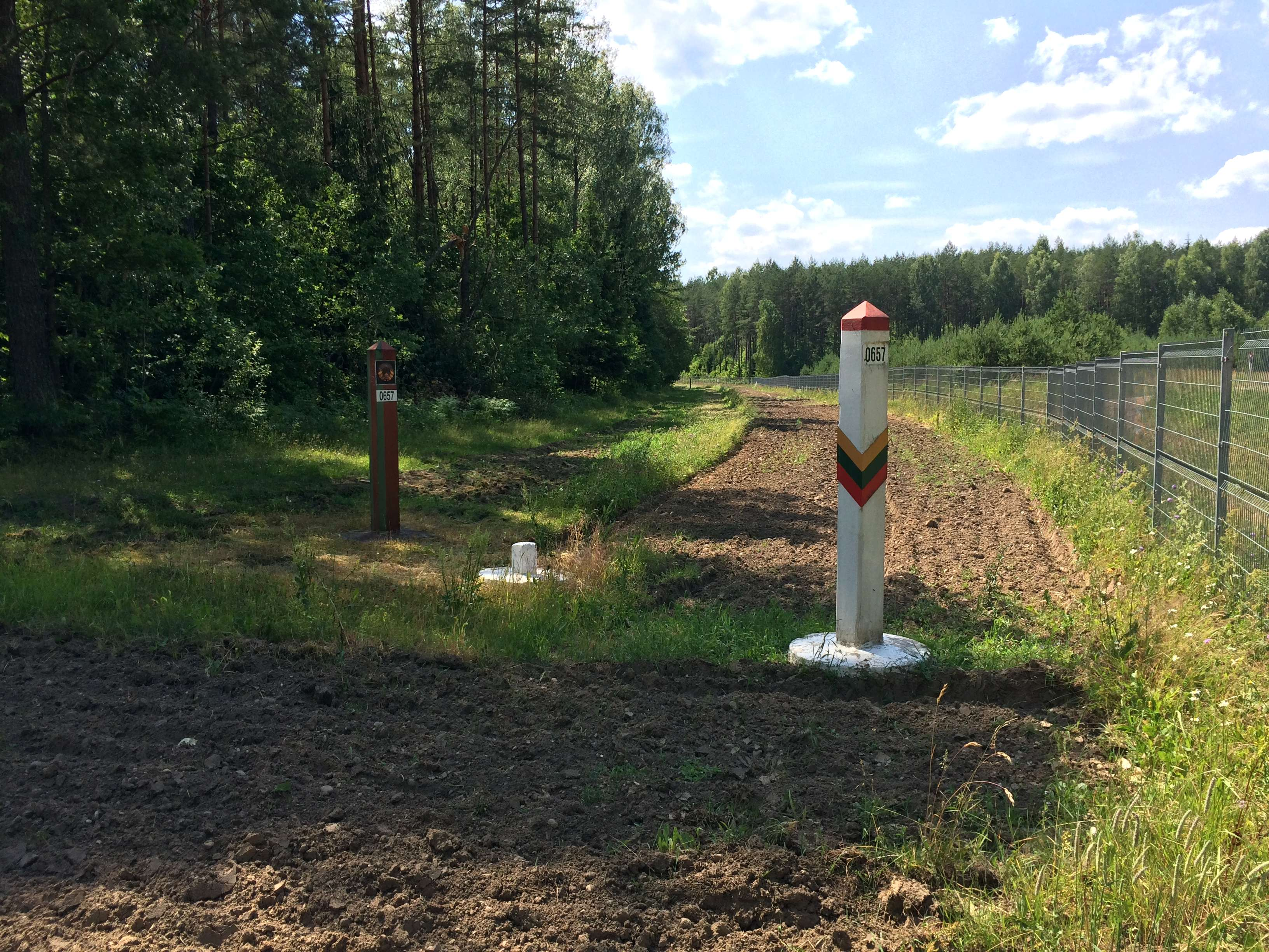 Lietuvos-Baltarusijos siena